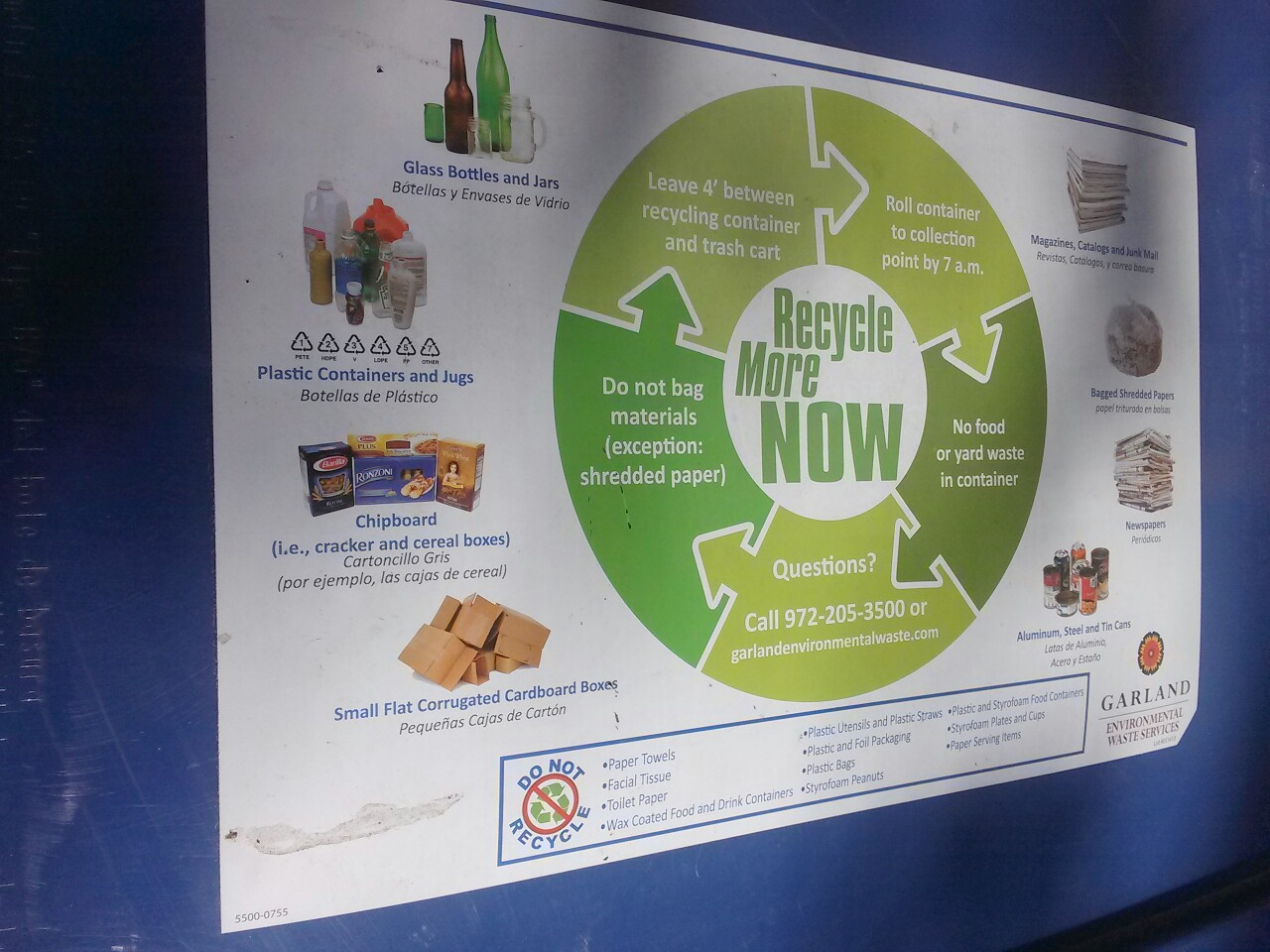 Materiales reciclables para el contenedor azul de la ciudad de Garland, Texas